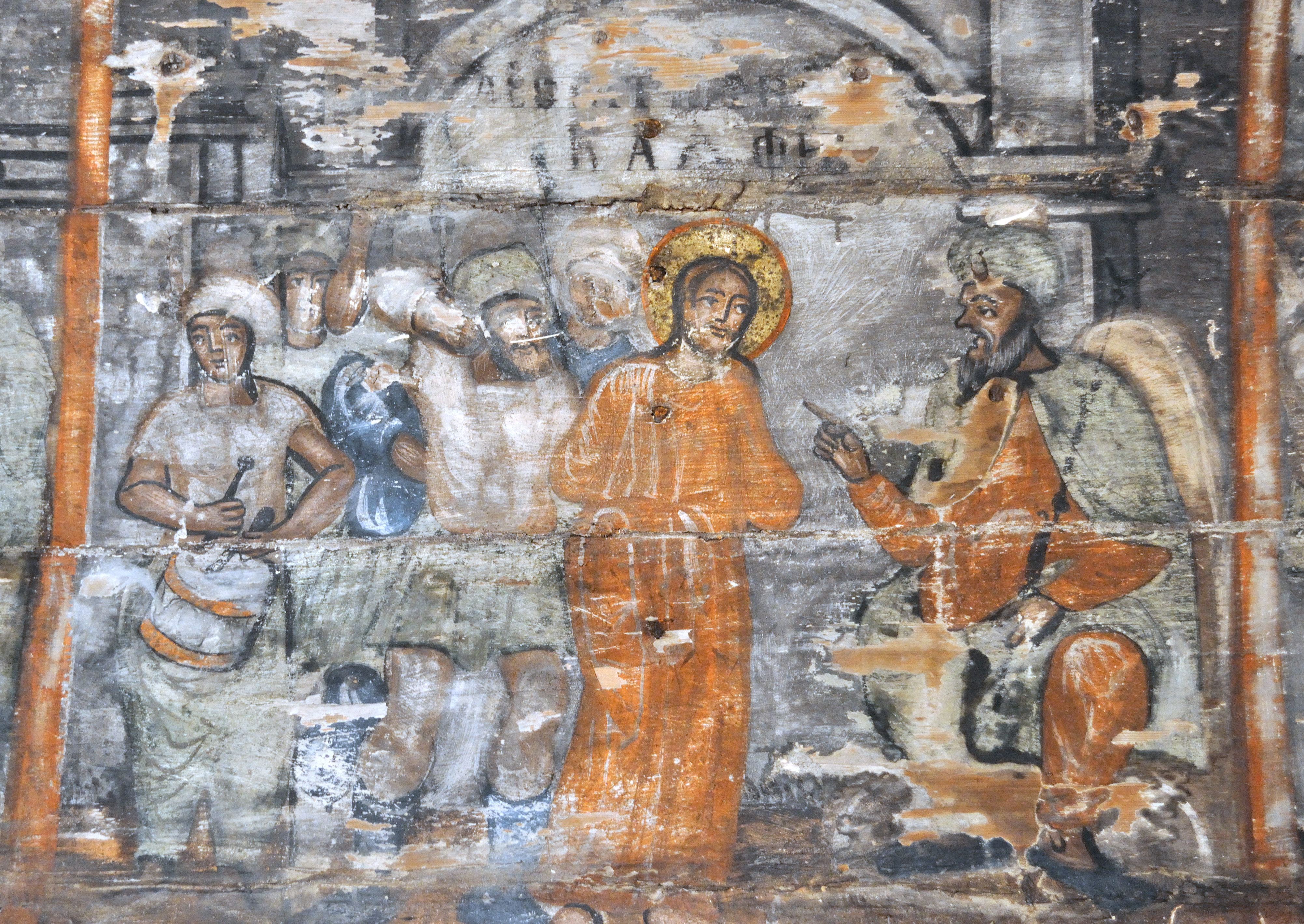 Biserica de lemn „Adormirea Maicii Domnului” din Lăpugiu de Jos, județul Hunedoara